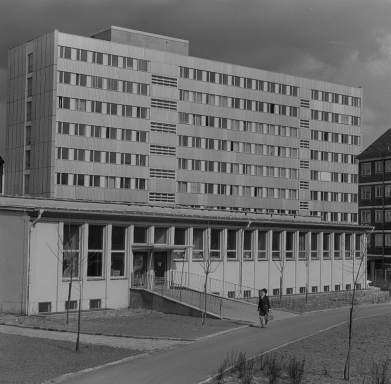 Original image description from the Deutsche Fotothek Dresden. Wirtschaftsrat des Bezirkes Dresden, Rückfront